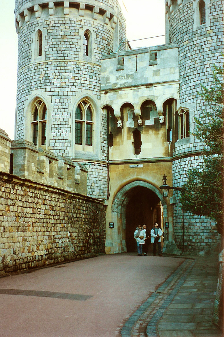 Windsor Schlsass1